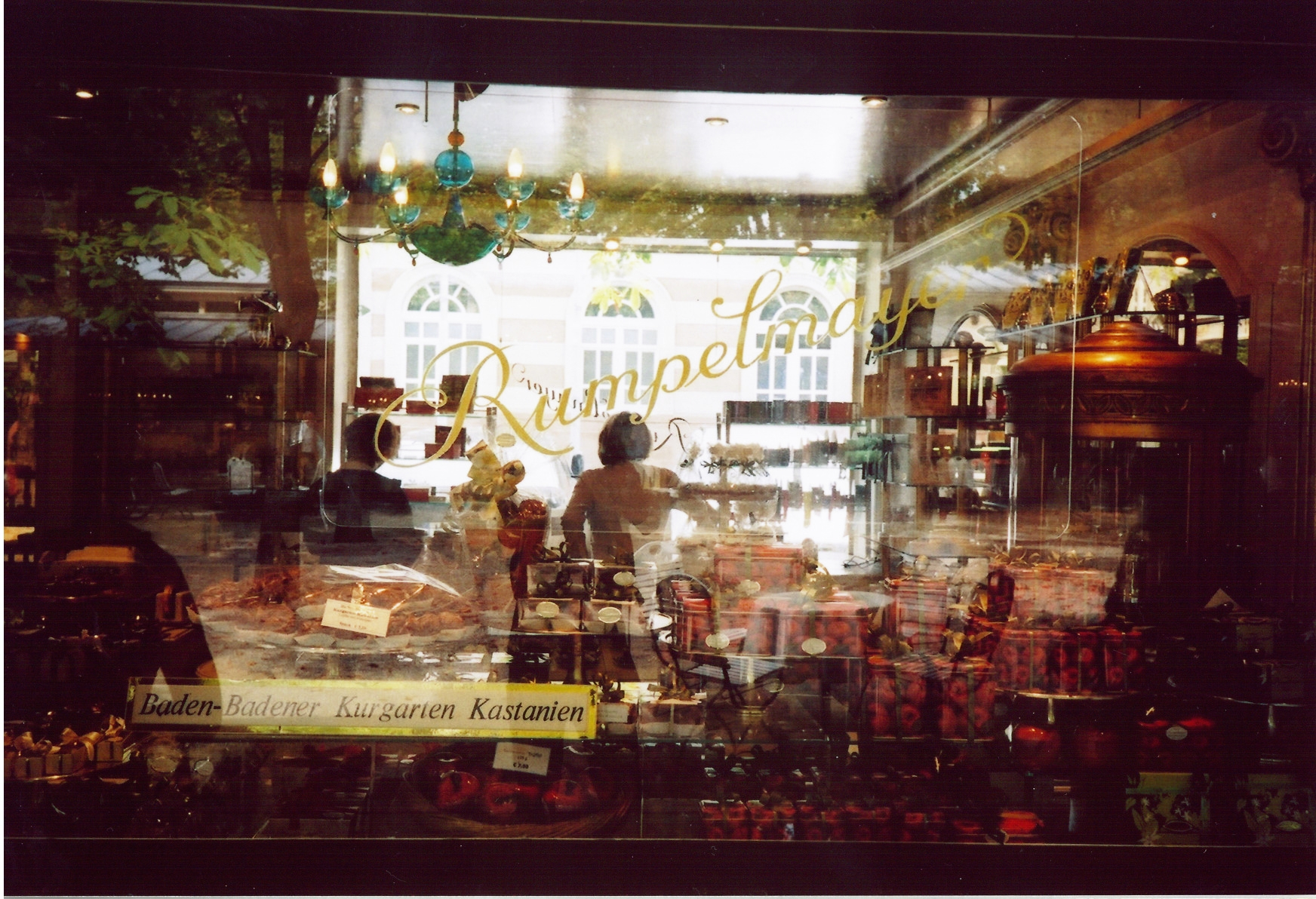 Rumpelmayer